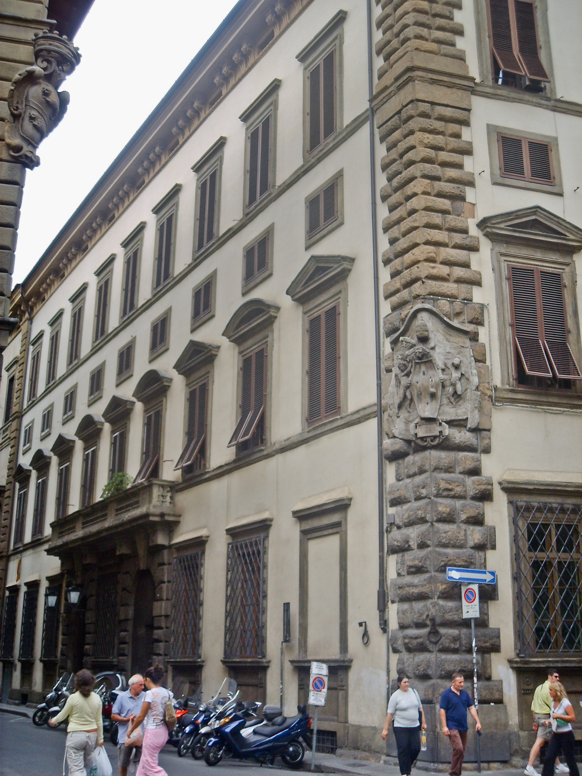 Palazzo Pucci in Florence, Italy